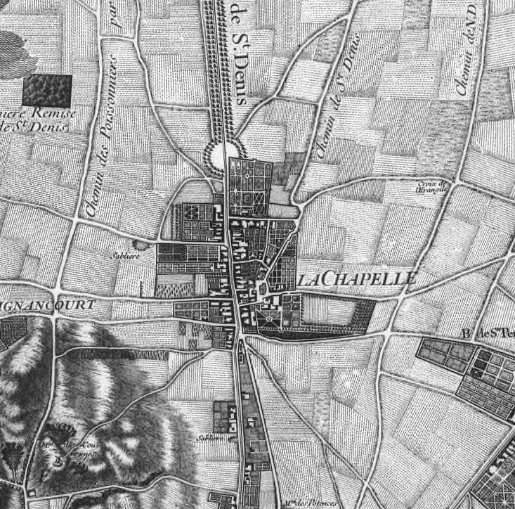 Extrait du plan de Roussel de la région parisienne montrant le village de La Chapelle